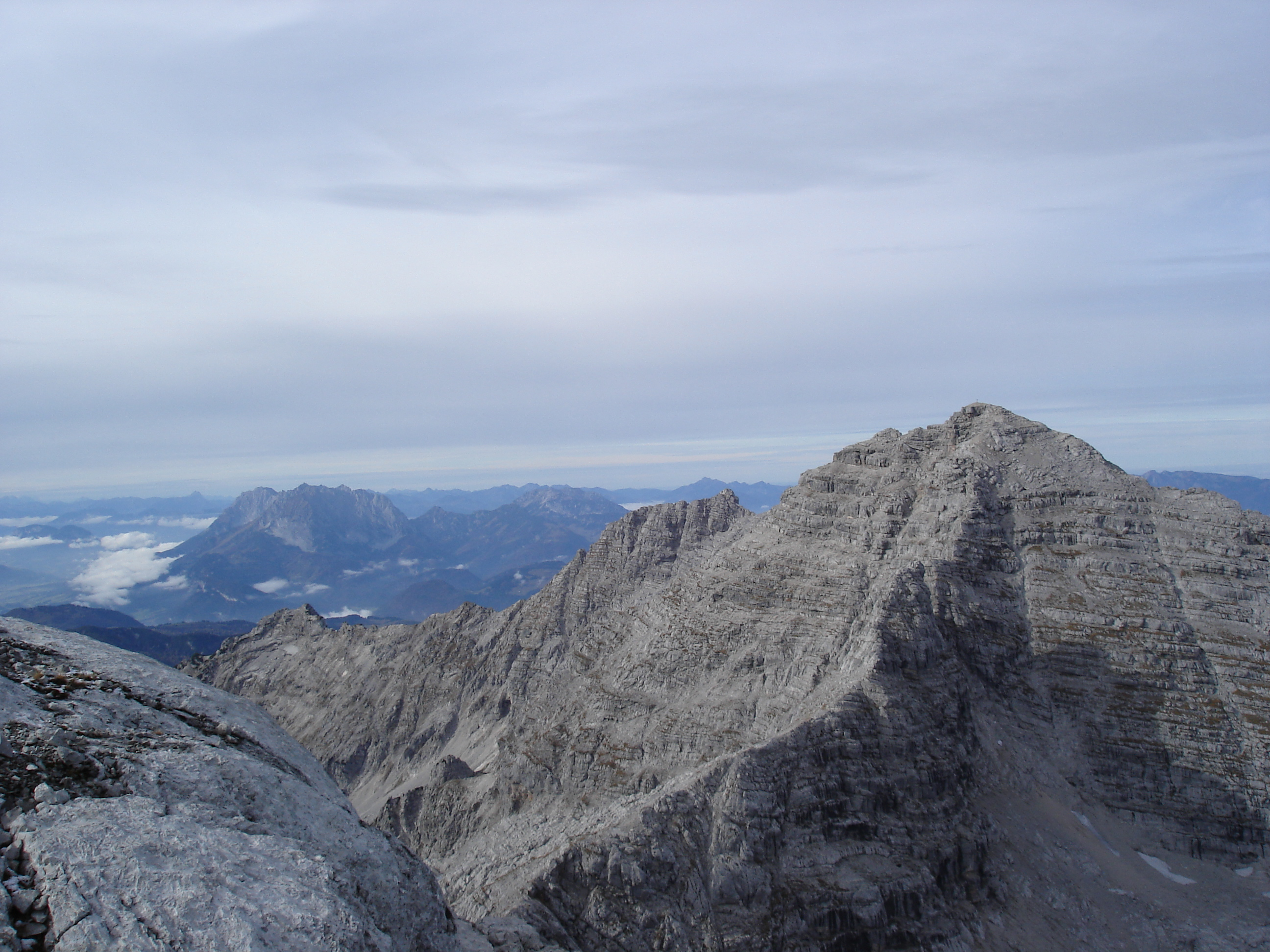 description: Loferer Steinberge, Mitterhorn vom Gipfel des Kreuzreifhorns Source: Eigene Aufnahme created: 2005-11-02